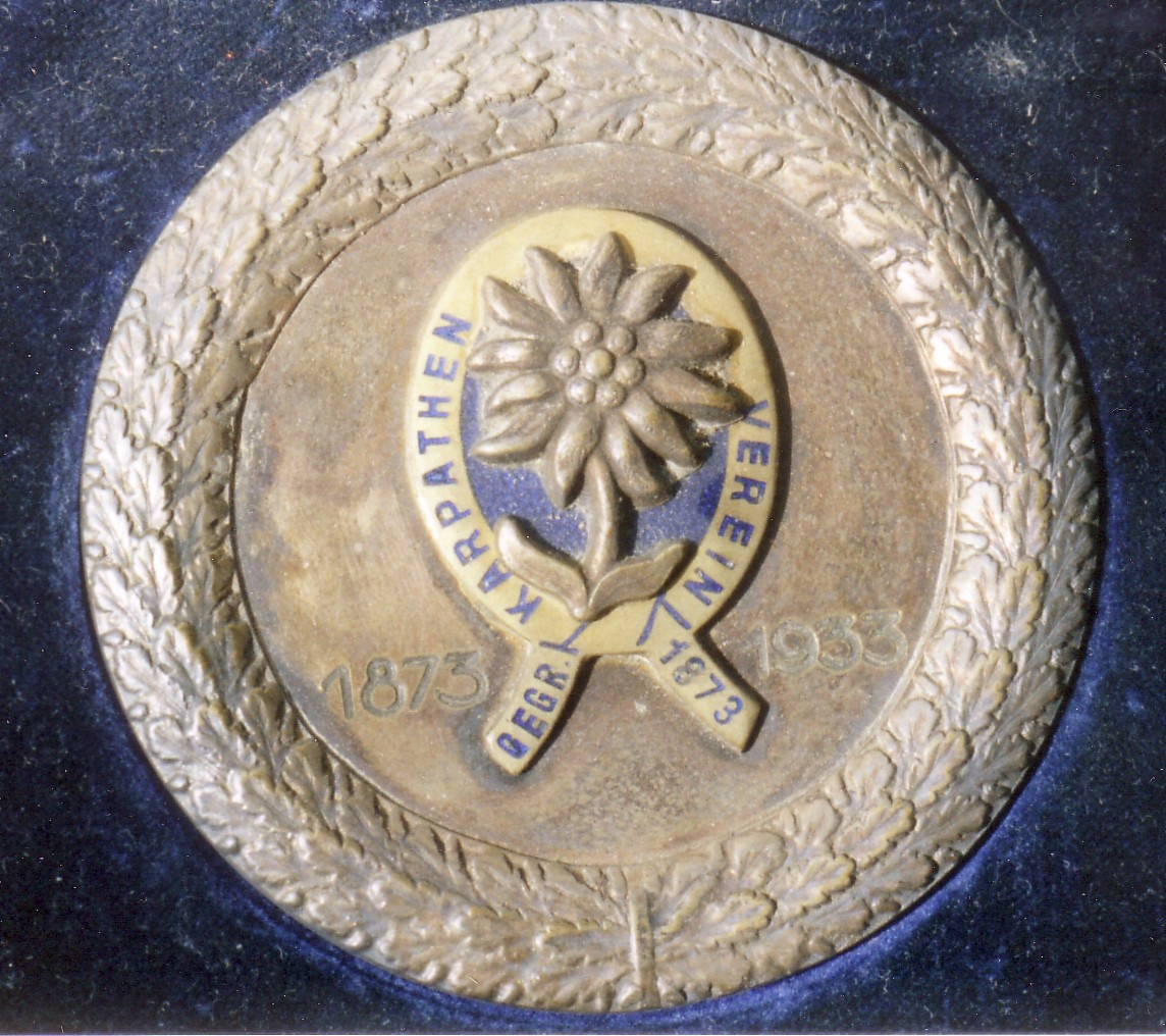 Erinnerungsmedaille zum 60jährigen Jubiläum der Gründung des Karpathenvereins (1873 - 1933)